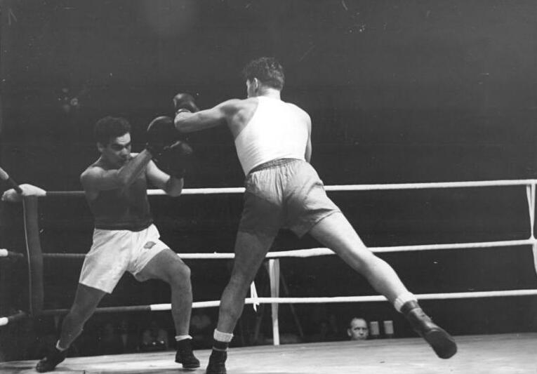 Wengrzyniak, Szabo XY Zentralbild III 15 Motive 2.10.1954 Internationales Boxturnier im Wassil-Lewski-Stadion in Sofia im September 1954 (Bulgarien) Das grosse internationale Länderturnier im Boxen wurde am 22. September abgeschlossen. Die polnische Staffel belegte mit 10:0 Punkten den ersten Platz. An zweiter Stelle steht die Sowjetunion, gefolgt von Bulgarien, Ungarn, der Tschechoslowakischen Republik und der Mannschaft der Deutschen Demokratischen Republik. UBz: Boxkampf zwischen Wengrzyniak (Polen) und Szabo XY (Ungarn), Schwergewicht.